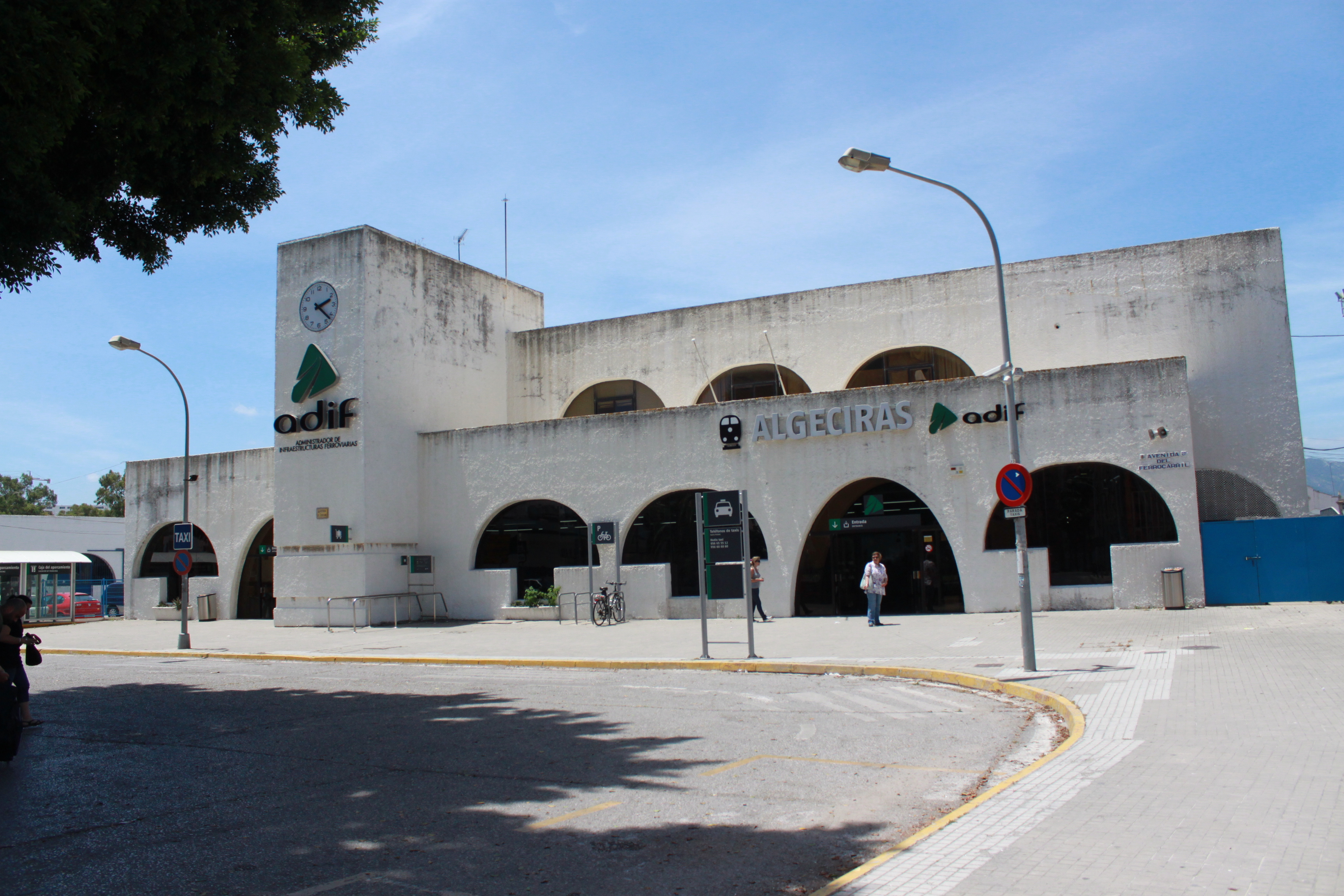 Estación de ferrocarril de Algeciras, Andalucía, España.